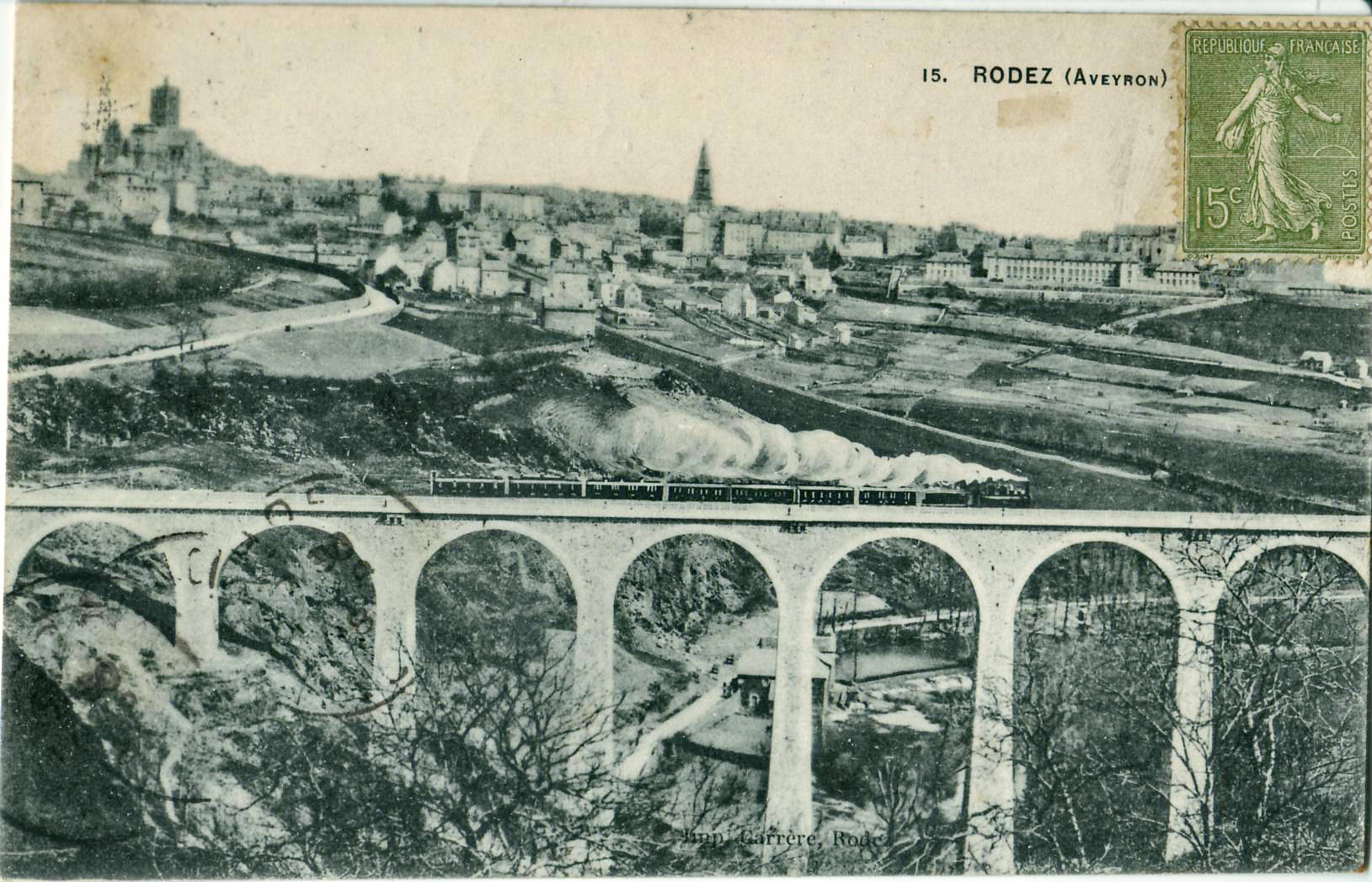 Carte postale ancienne éditée par Garrère à Rodez, n°15 :RODEZ (vue générale, viaduc de la Gascarie en premier plan)